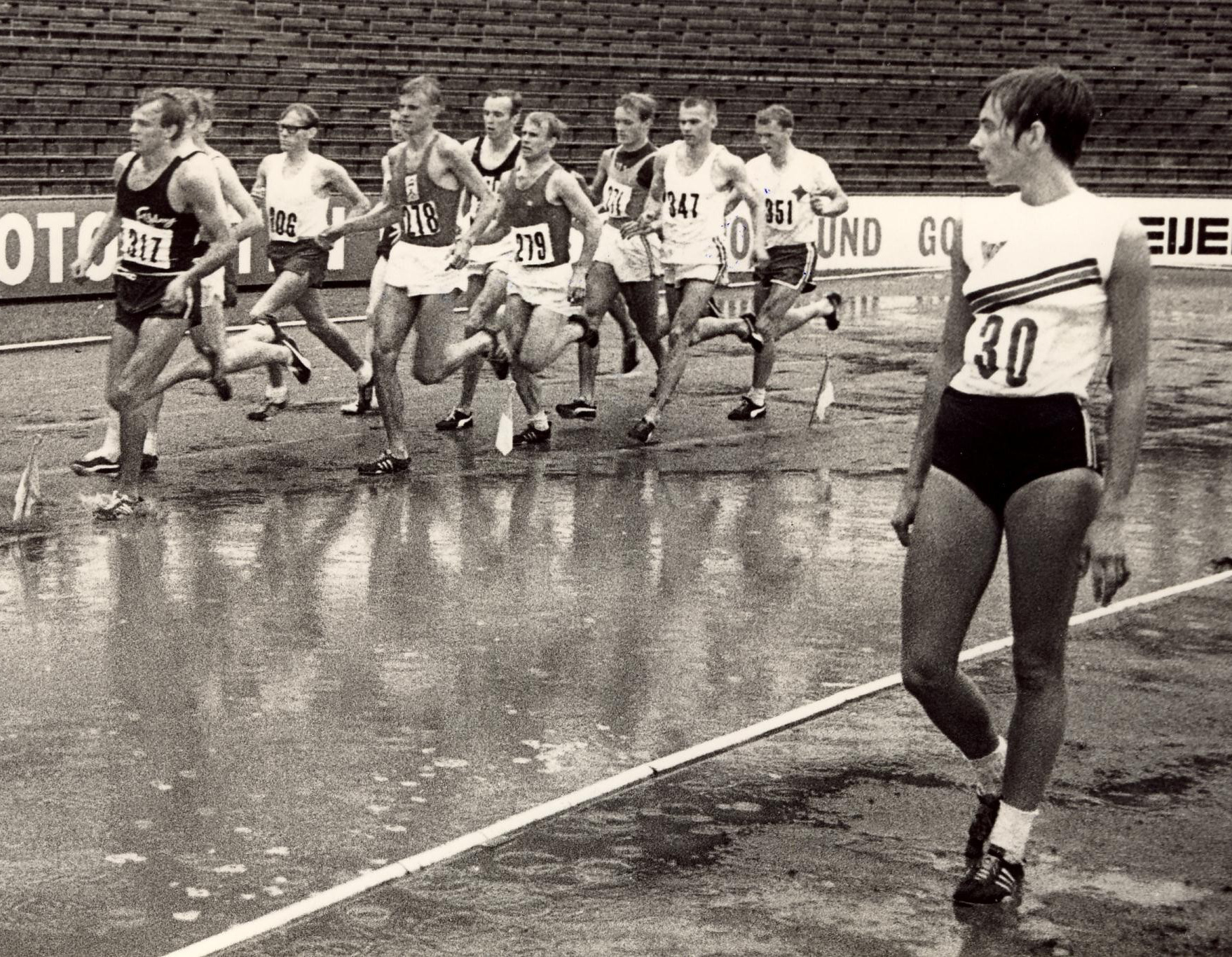 Birgitta Larsson-Tollan